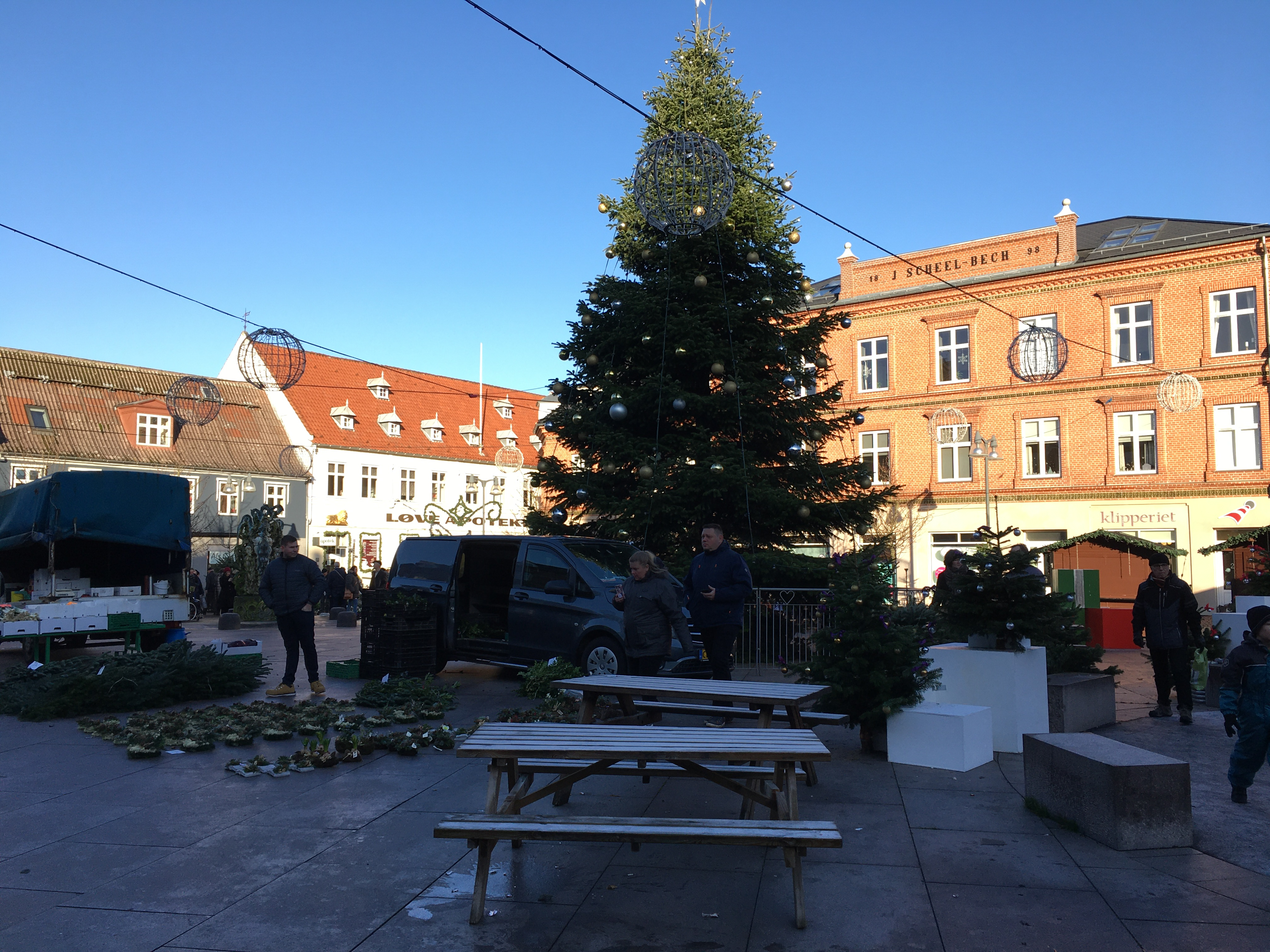 Juletræ på Axeltorv